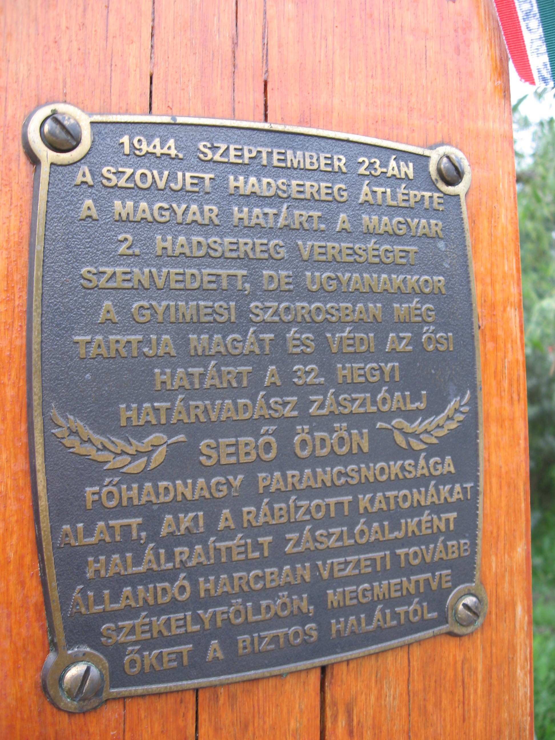 Sebő Ödön főhadnagy kopjafafelirata, Gyimesbükk